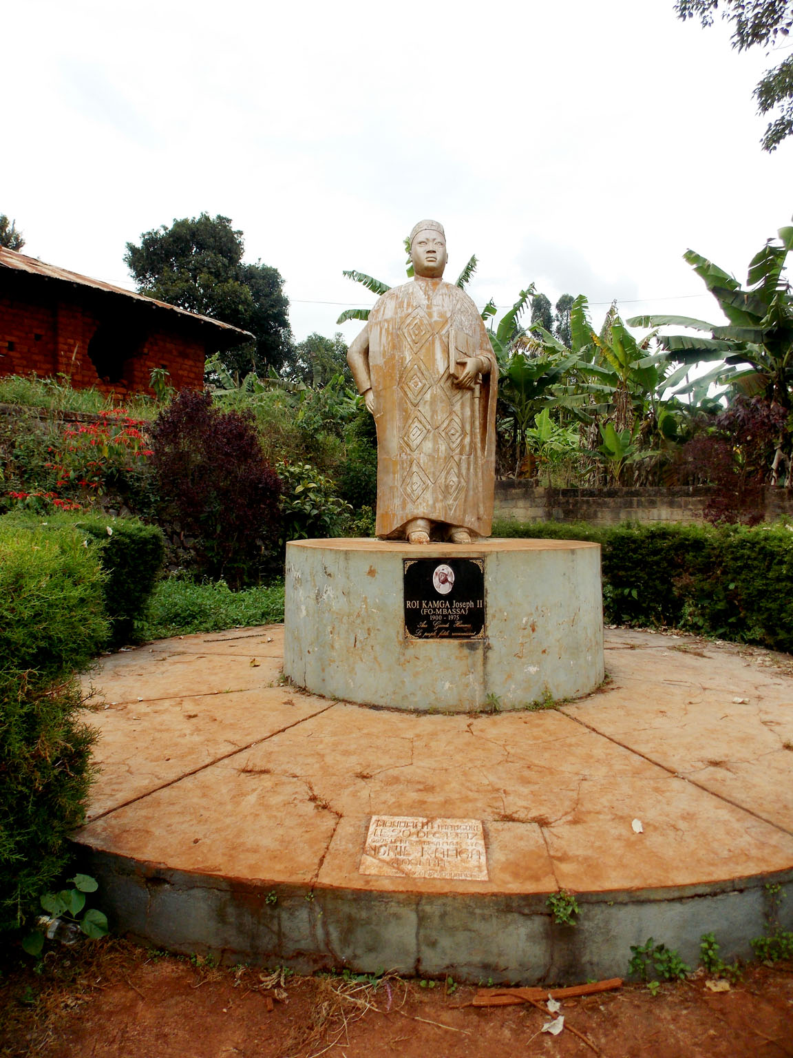 Statue de celui qui a été considéré comme le plus grand ou emblématique roi des Bandjoun KAMGA Joseph II (Fo MBASSA) de 1900-1975